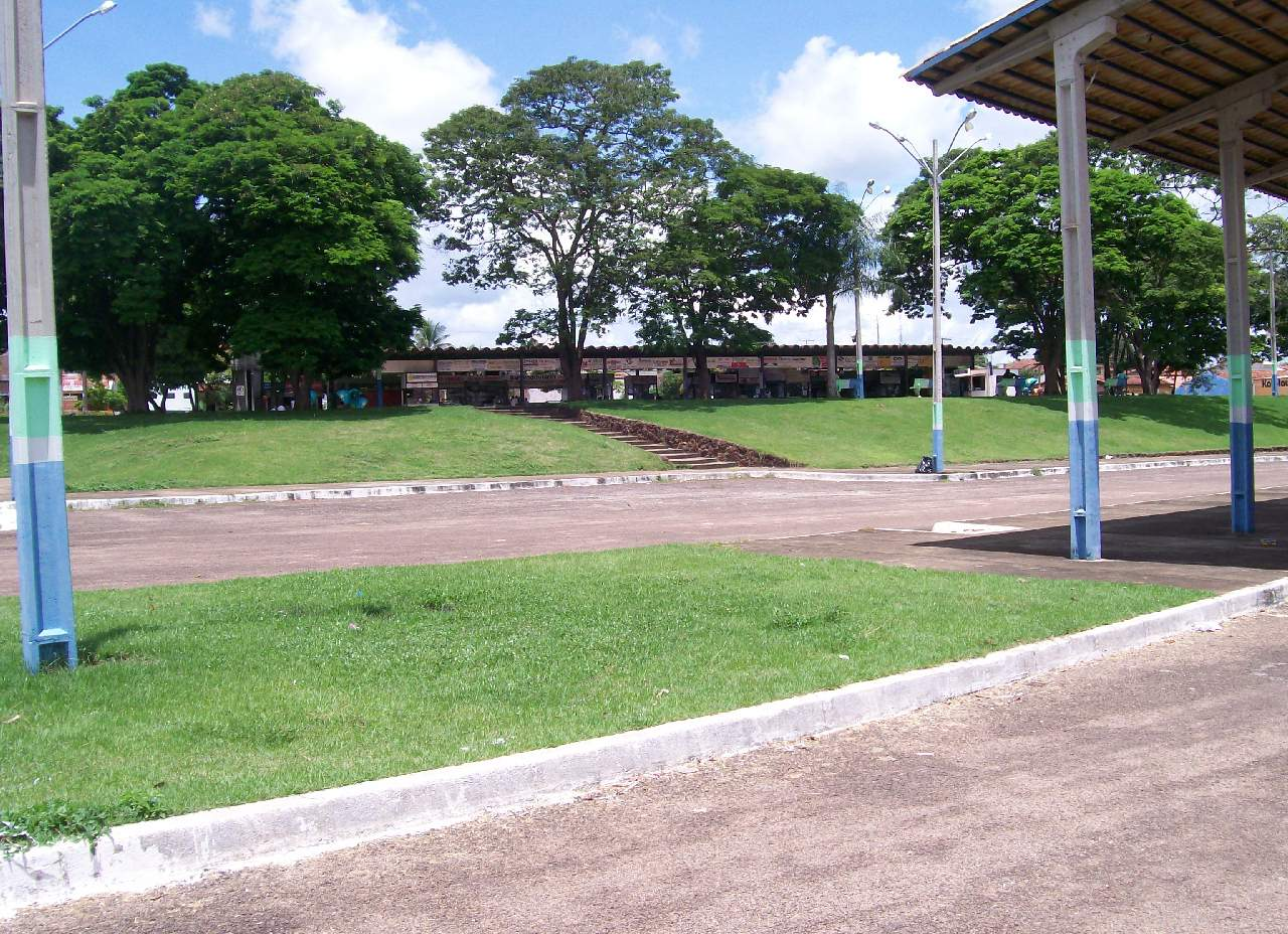 Gurupi Tocantins, Brasil.